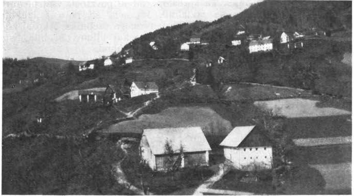 Vas Podlonk pod Ratitovcem.